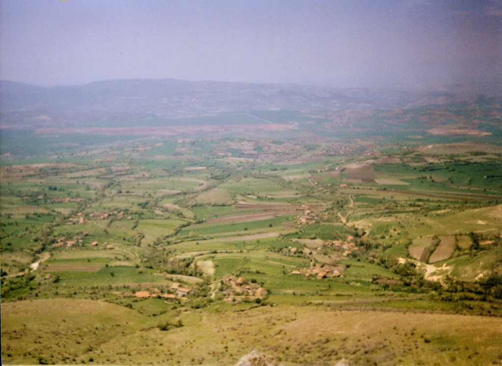 Murgaš, Macedonia